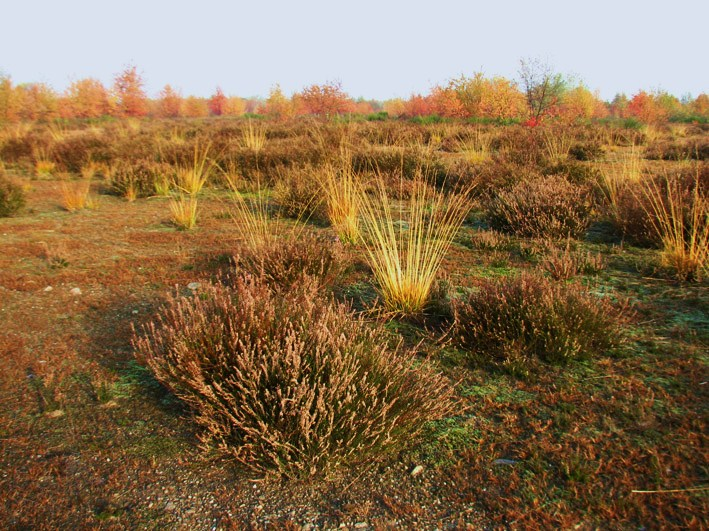 Brughiera di Malpensa-Malpensa heathland-Parco del Ticino, Italy